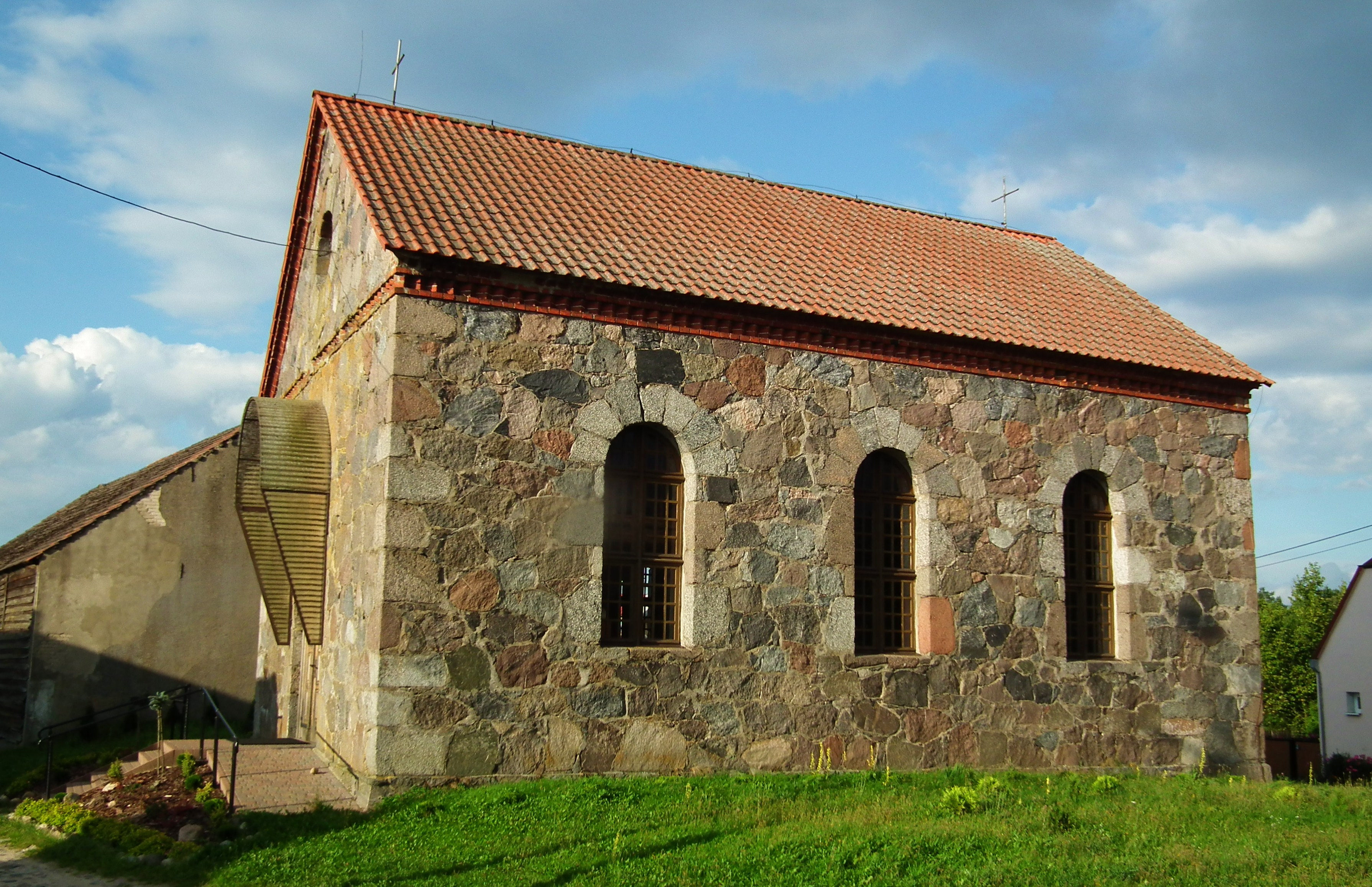 Kościół NSPJ w Czarnem Wielkim.